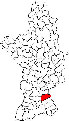 Categorie:Hărţi ale judeţului Olt